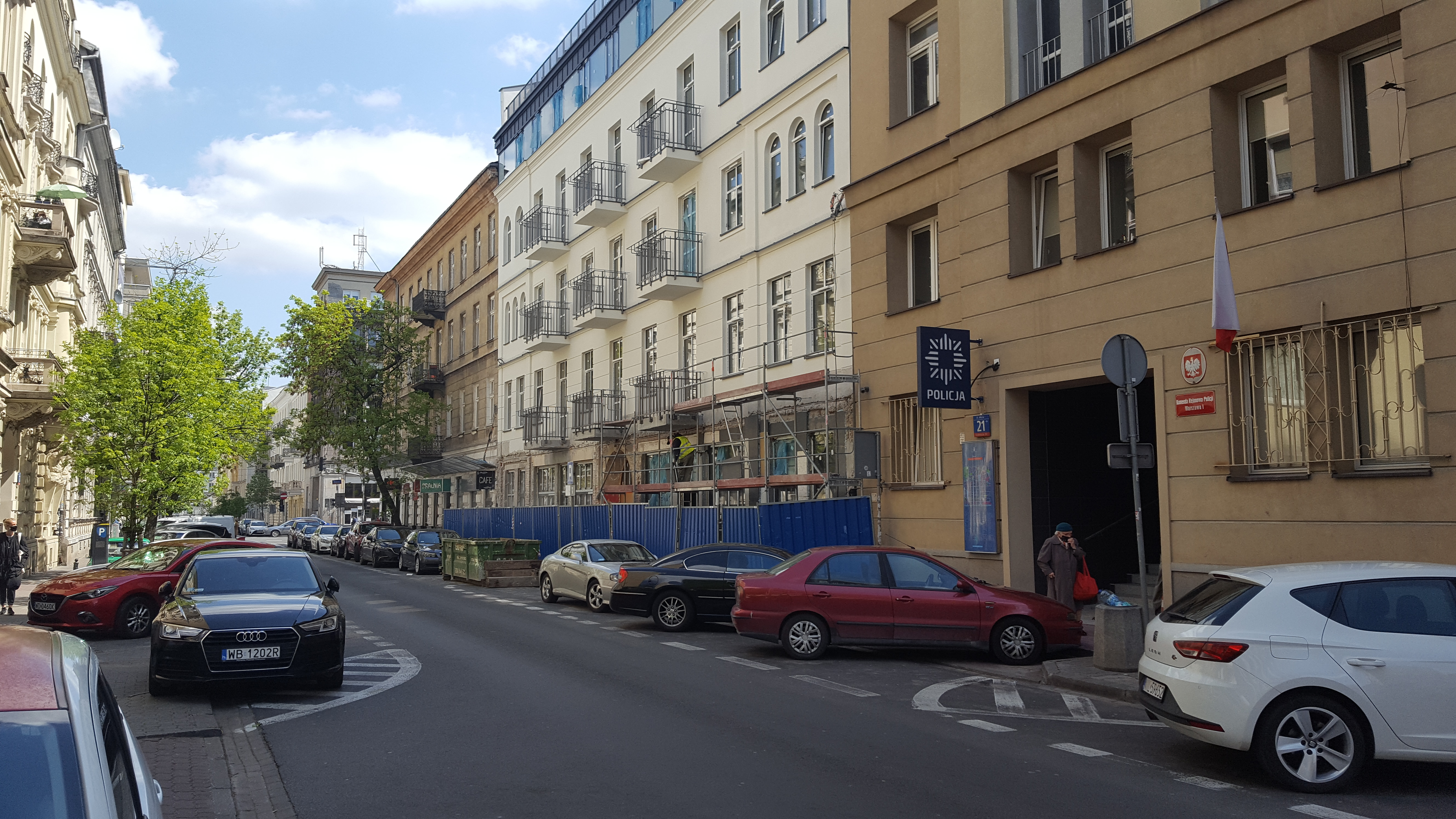 21 Wilcza Street in Warsaw, Police station